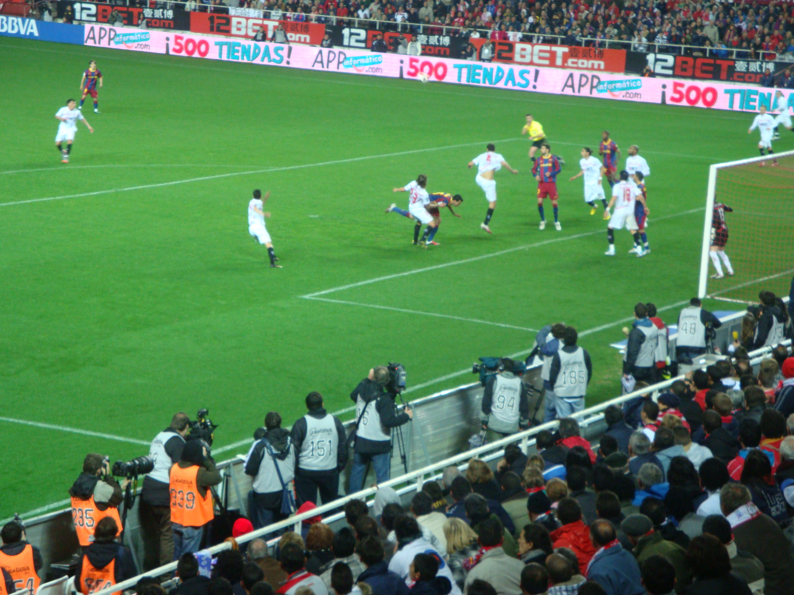 Lan cel juego en el partido Sevilla- FC Barcelona. Estadio ramón Sánchez Pizjuán . Temporada 2010/2011